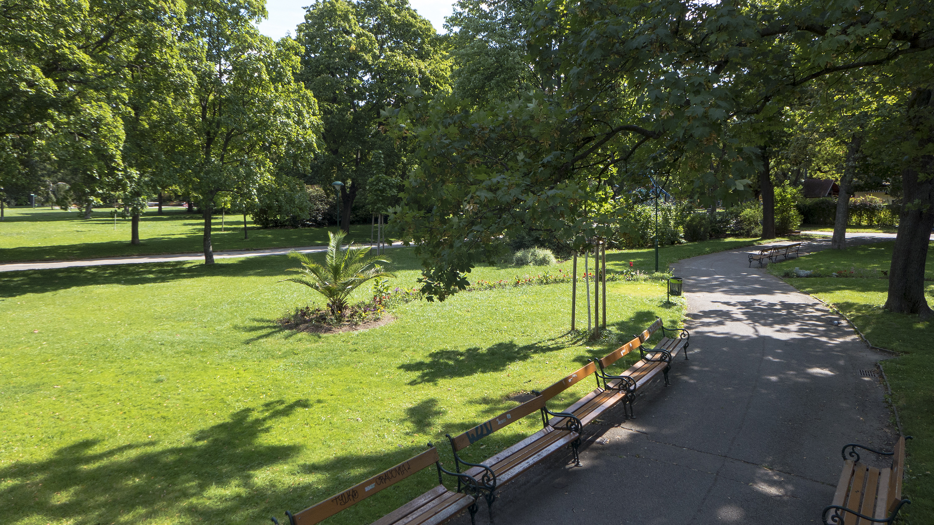 Schweizergarten in Wien 3